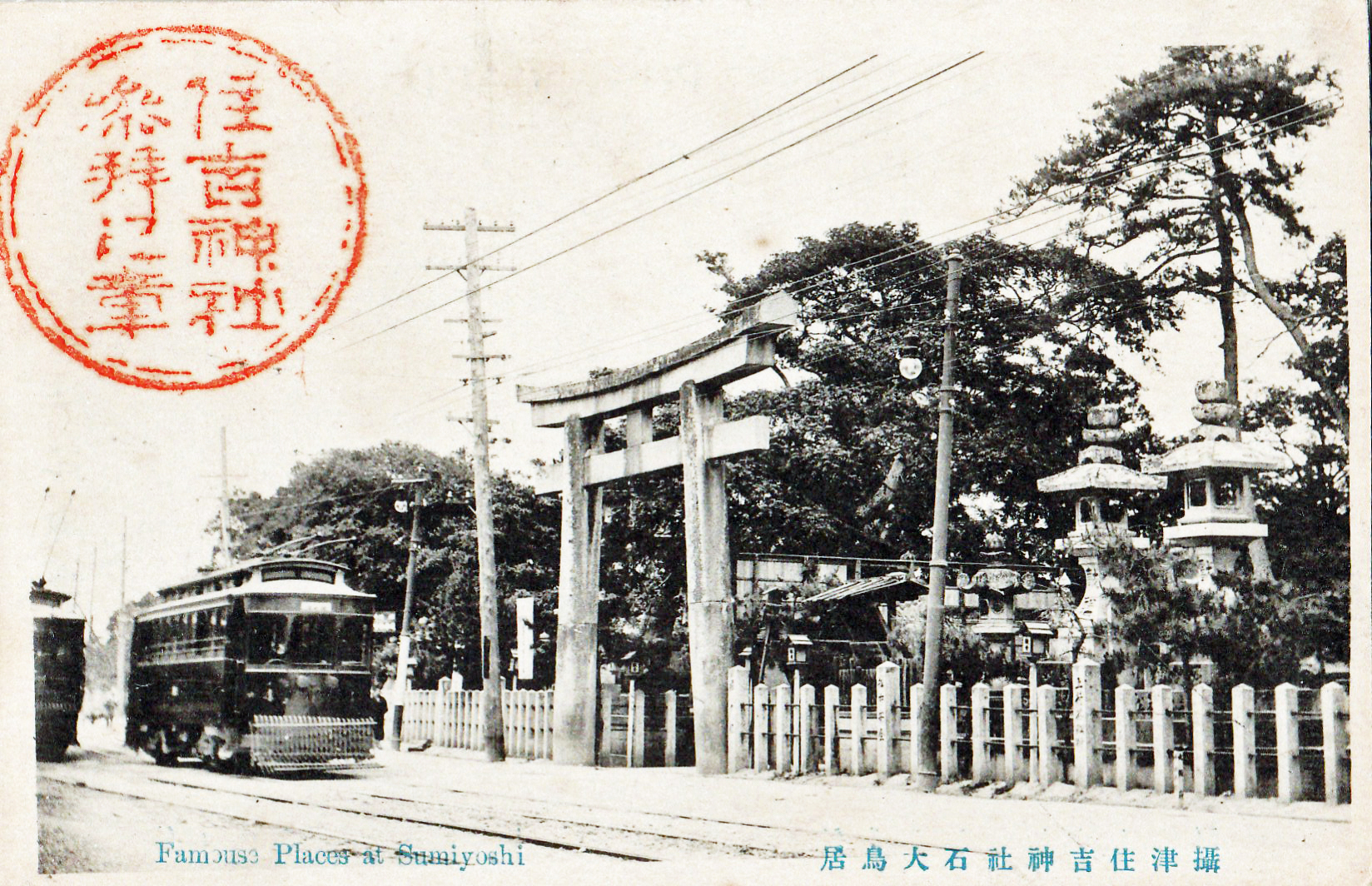 明治末の住吉鳥居前。